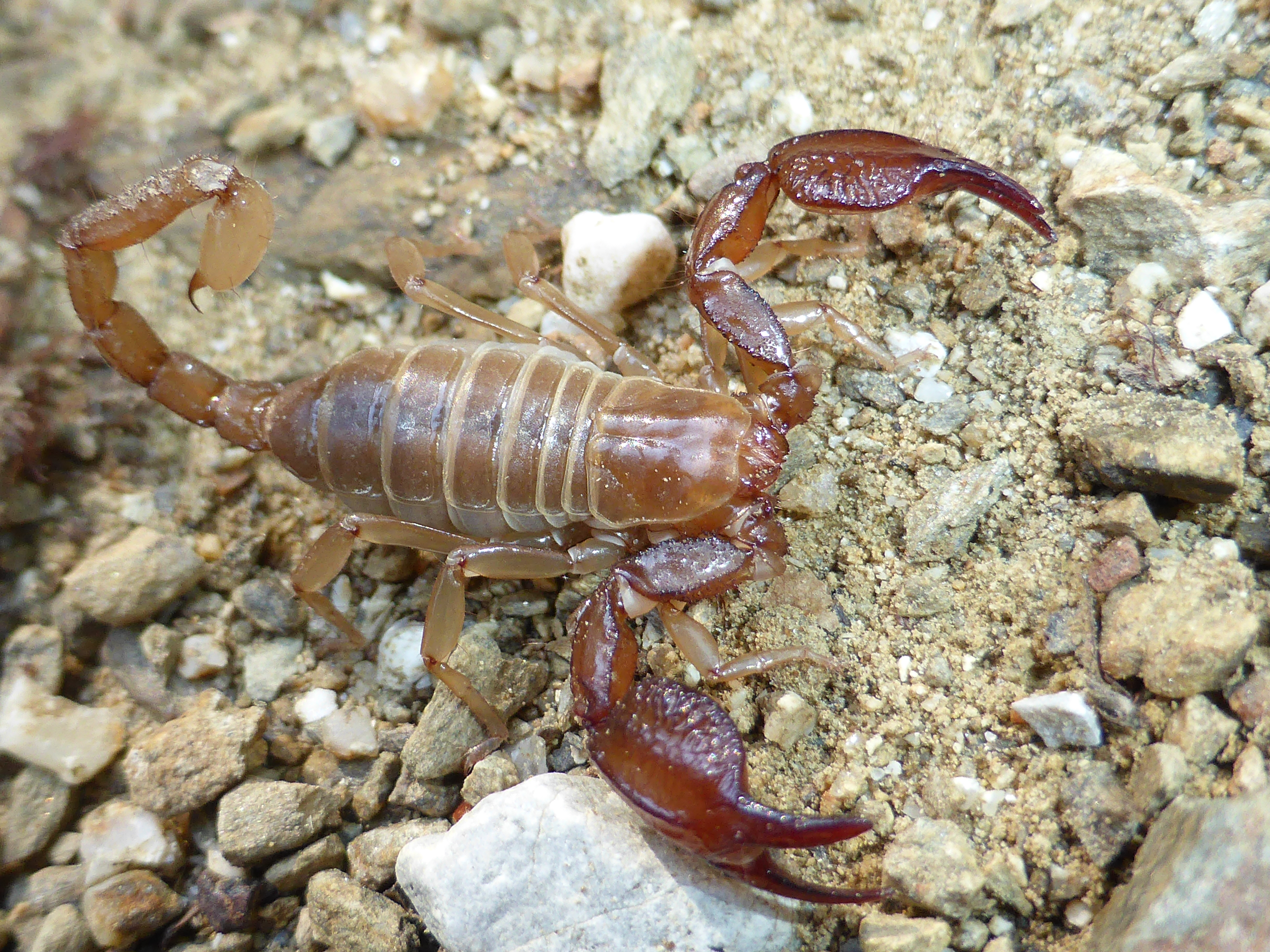 Belisarius xambeui dans les Pyrénées-Orientales